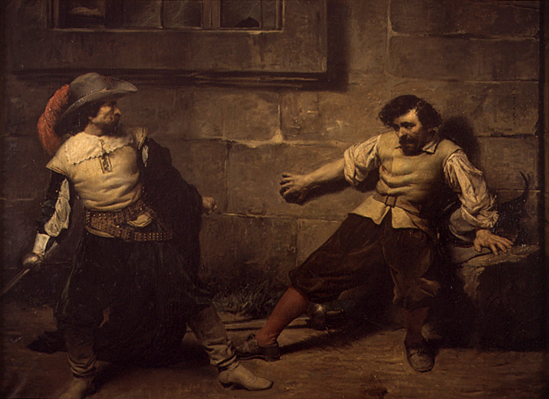 La obra representa un duelo a espada ocurrido en el siglo XVII.